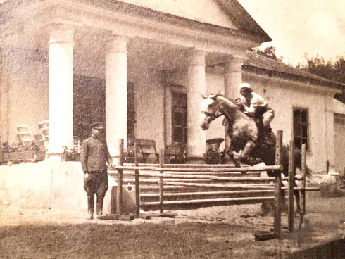 Беларуская (тарашкевіца): Стайкі (Stajki), сядзіба Багдановічаў (Bahdanovič)